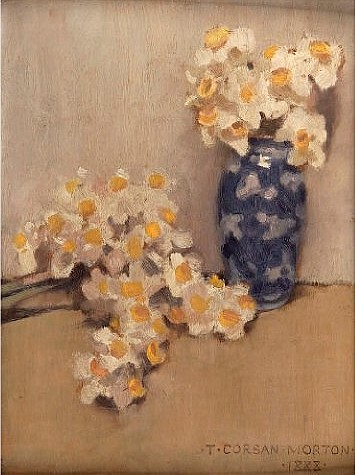 Daffodils